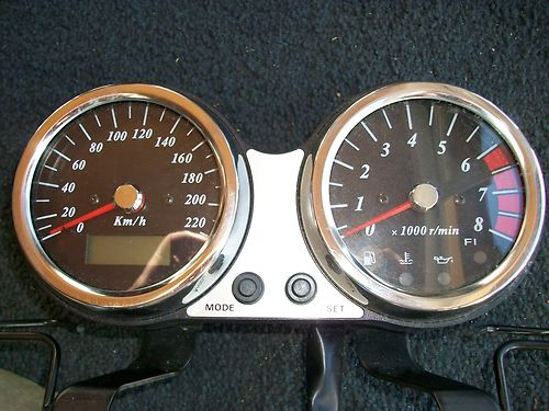 Панель приборов Сузуки Марадёр